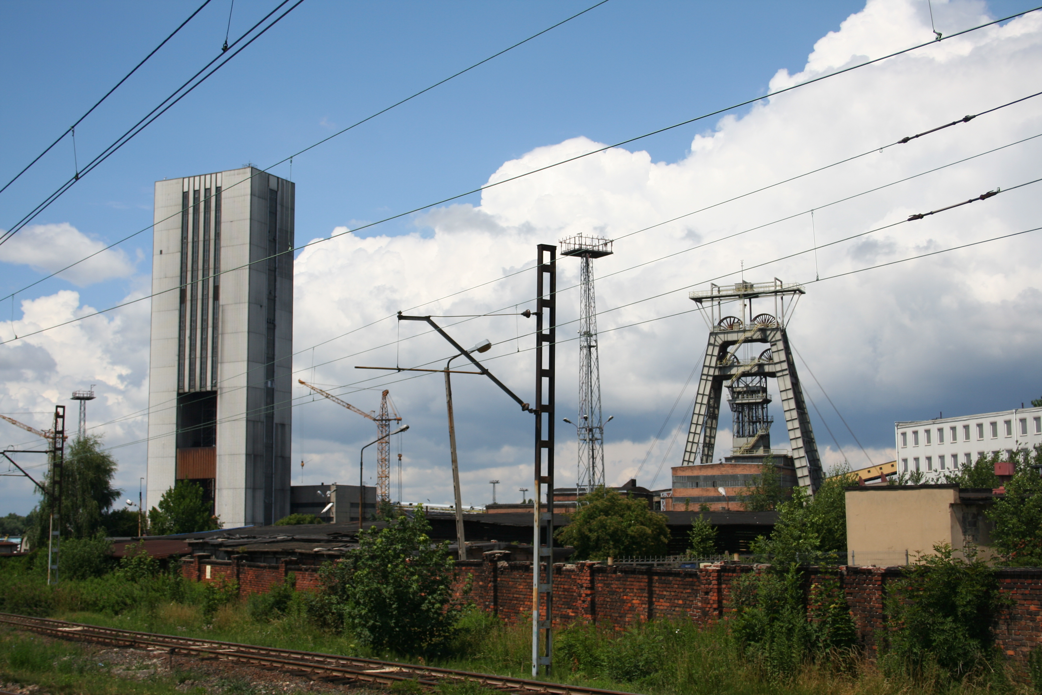 Tour de Wongiel. Wycieczka kolejowa po terenach przemysłowych Górnego Śląska.